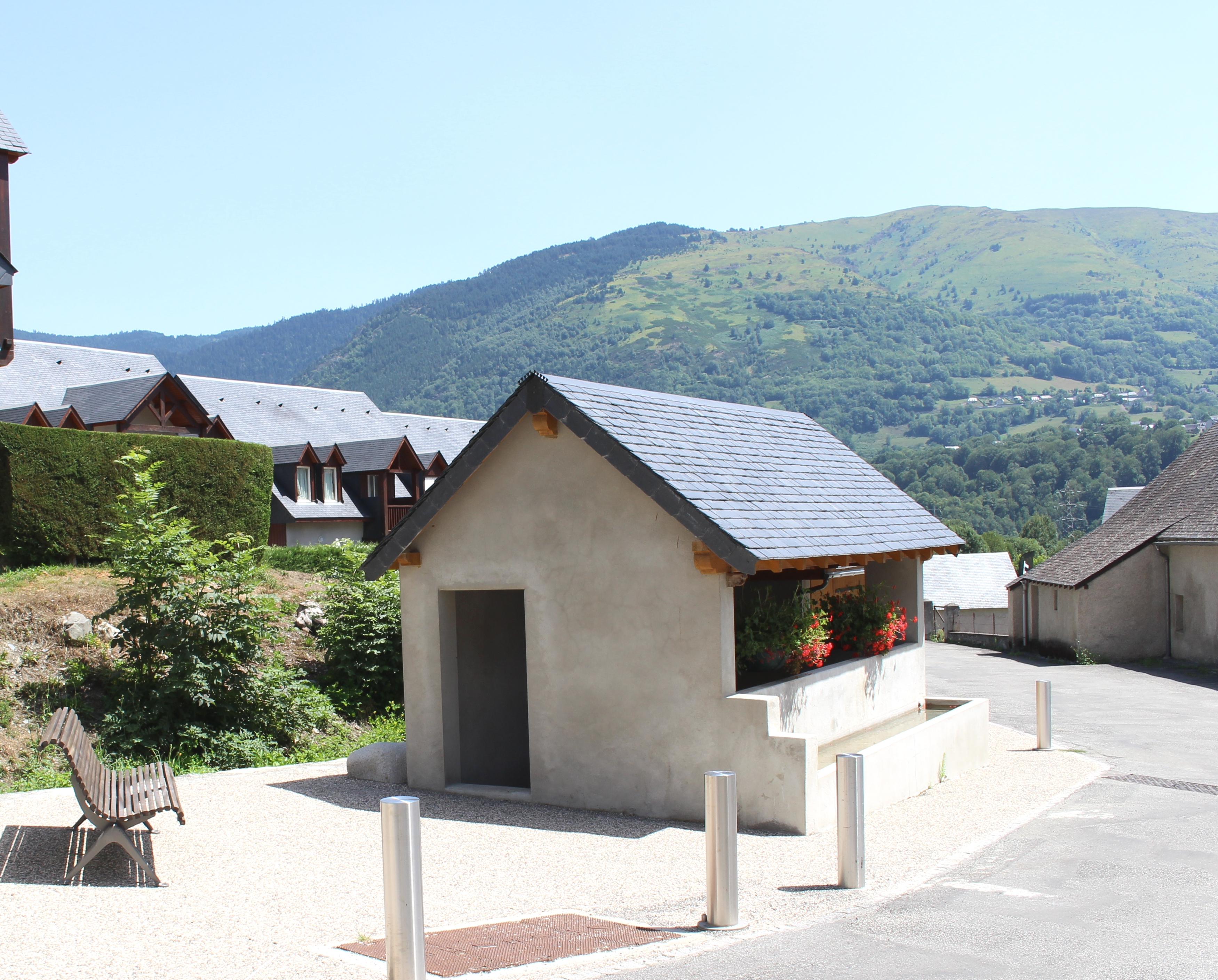 Lavoir de Vignec (Hautes-Pyrénées)